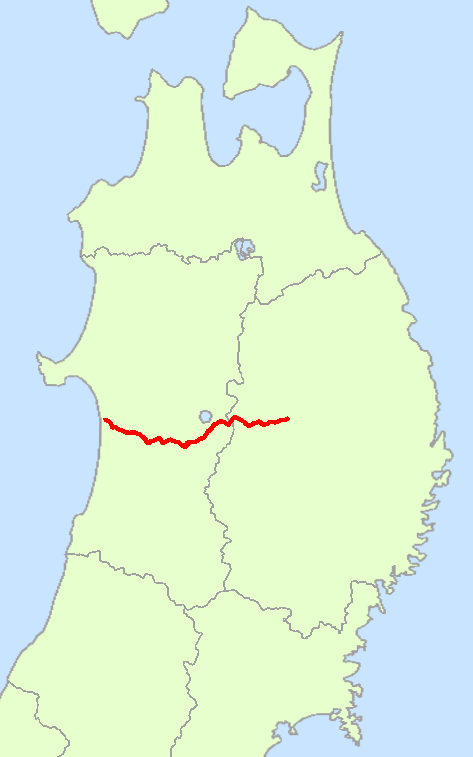 国道46号線の経路概略図